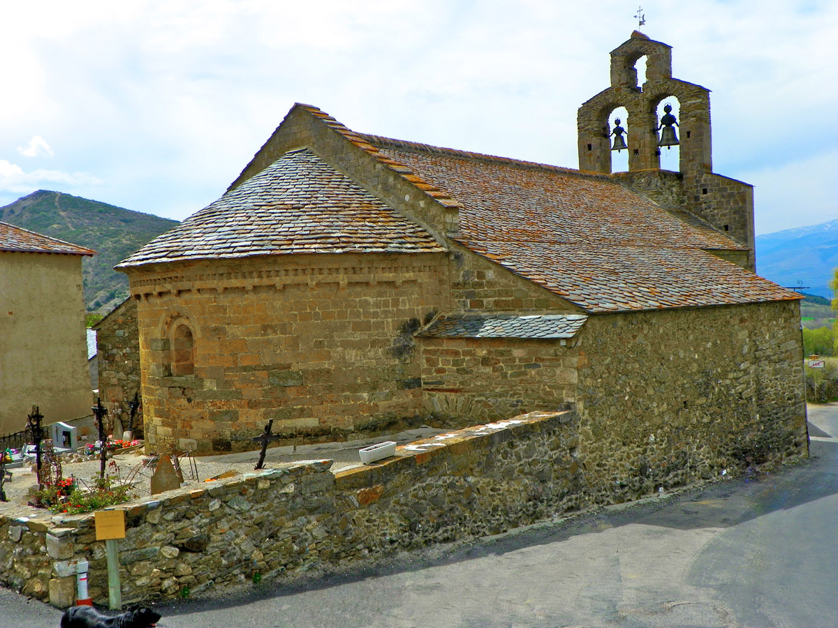 Sant Fructuós de Llo (Alta Cerdanya